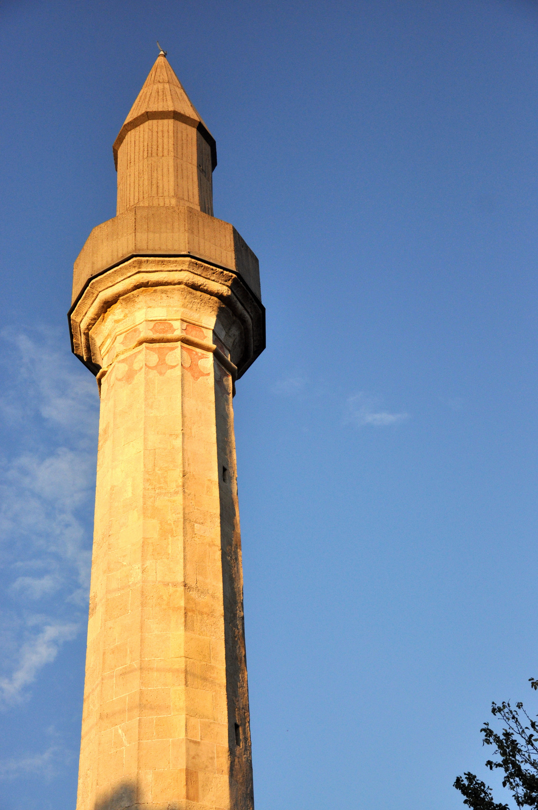 Minaret (Érd, Mecset u.) This is a photo of a monument in Hungary, Identifier: 7014